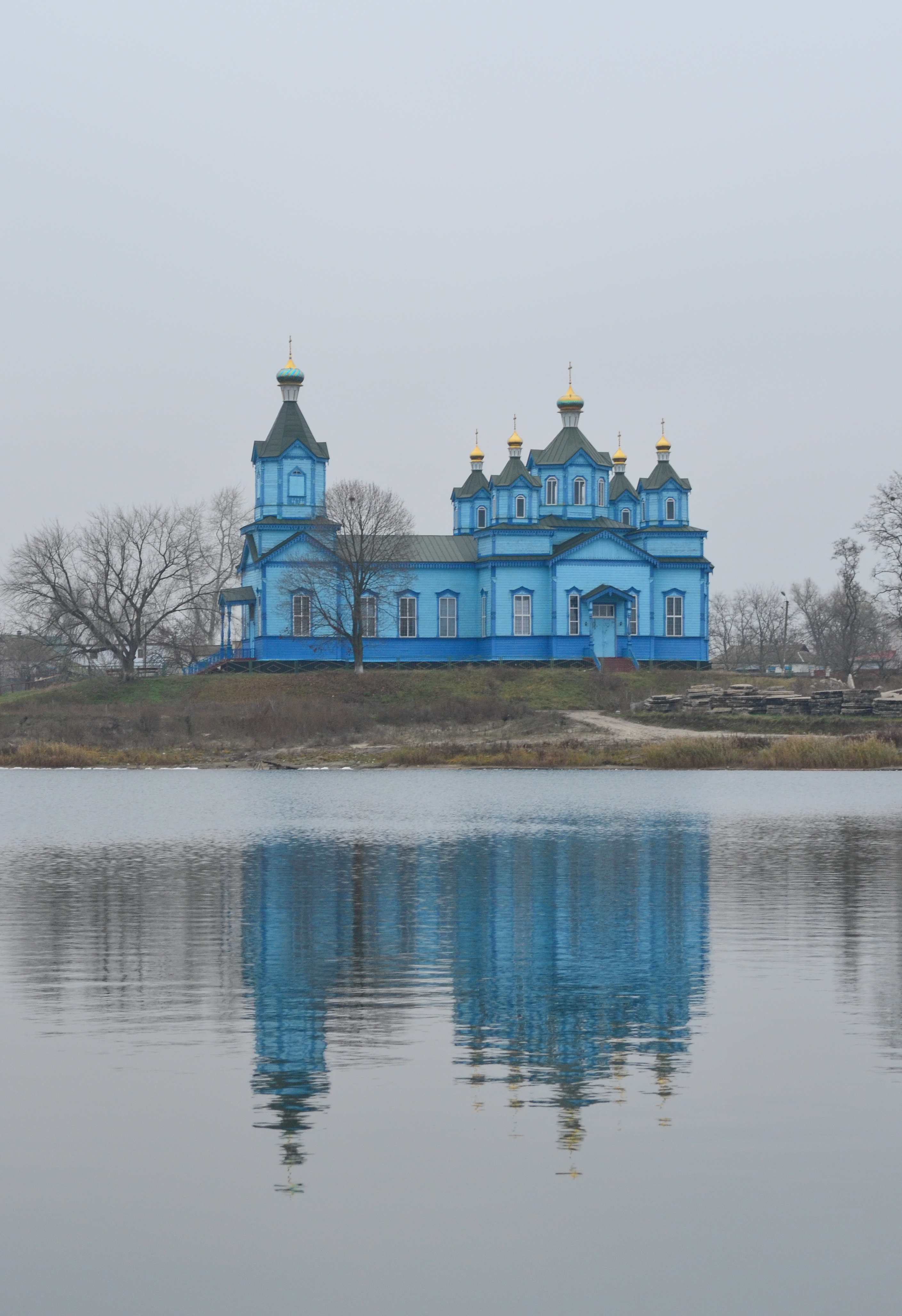 Миколаївська церква (дер.), село Рогозів